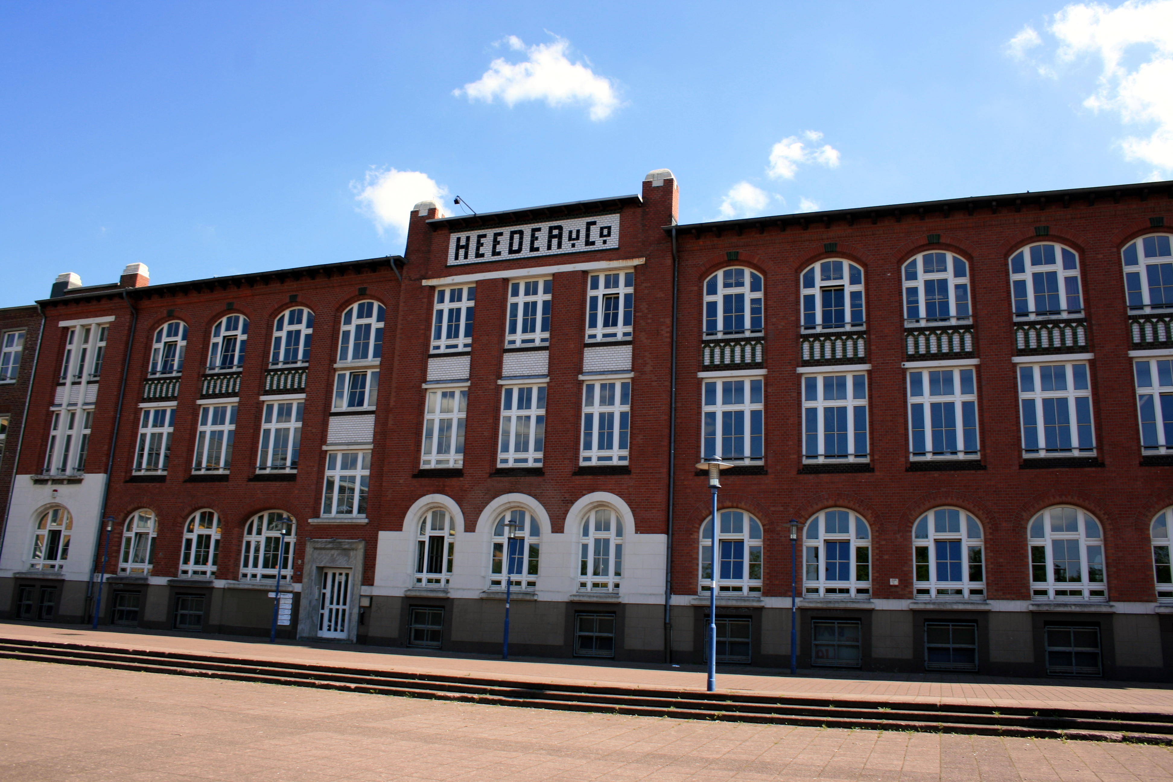 Krefeld, Kinder- und Jugendtheaterzentrum der Stadt in der Fabrik Heeder, Virchowstraße 130, Denkmal Nr. 365 This image shows a heritage building in Germany, located in the North Rhine-Westphalian city Krefeld (no. 365).